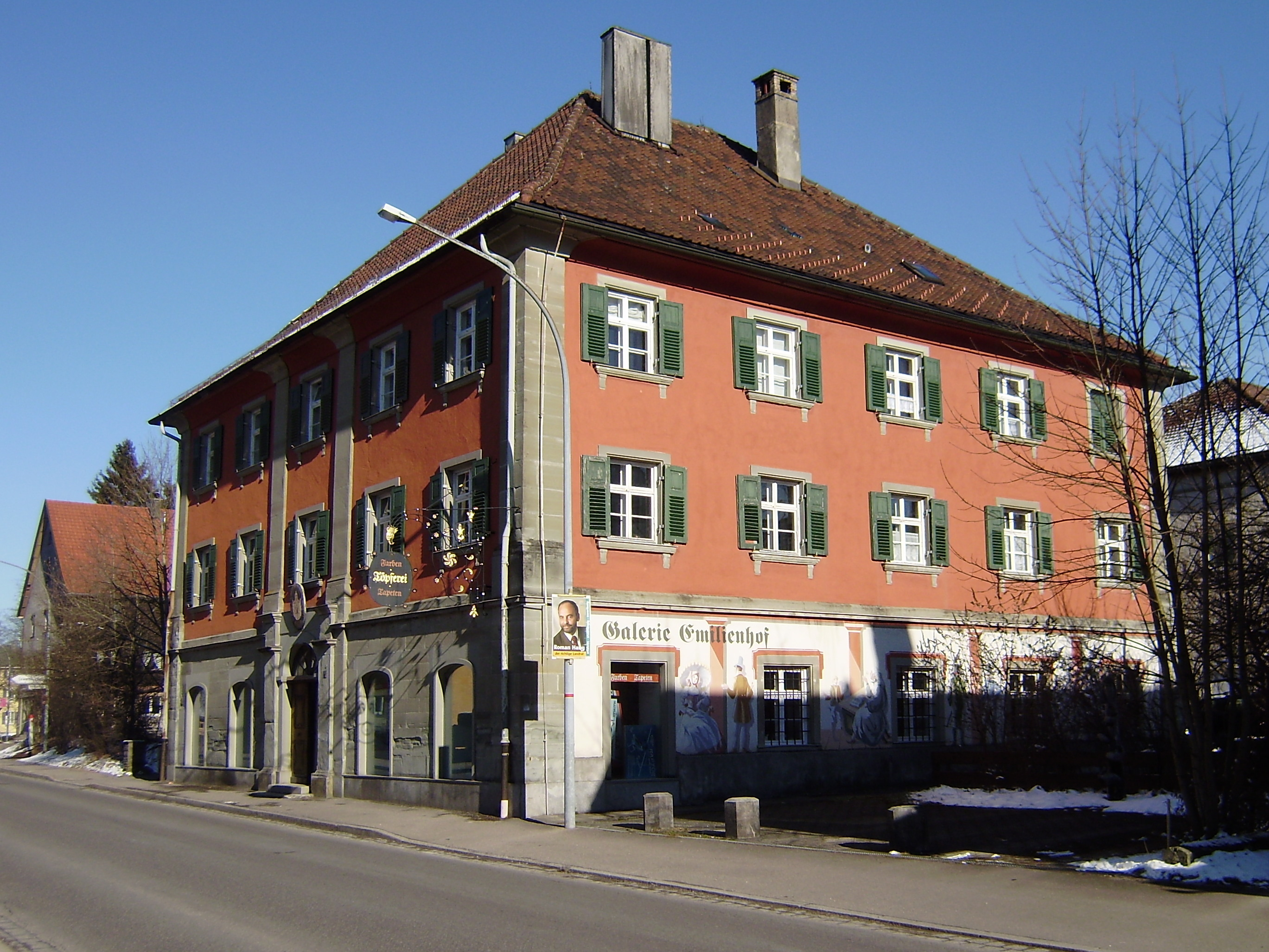 Ehemaliges Gerichtsgebäude von Weiler im Allgäu in der Alois-von-Brinz-Straße 10. 1802 erbaut als Musselin- und Kattunfabrik, 1807-1866 Königlich Bayerisches Landgericht Weiler, 1866-1918 Königlich Bayerisches Amtsgericht und 1918-1970 Bayerisches Amtsgericht, seit 1991 Wohn- und Geschäftshaus mit Töpferei, Galerie, Architekturbüro,Modellbaushop.